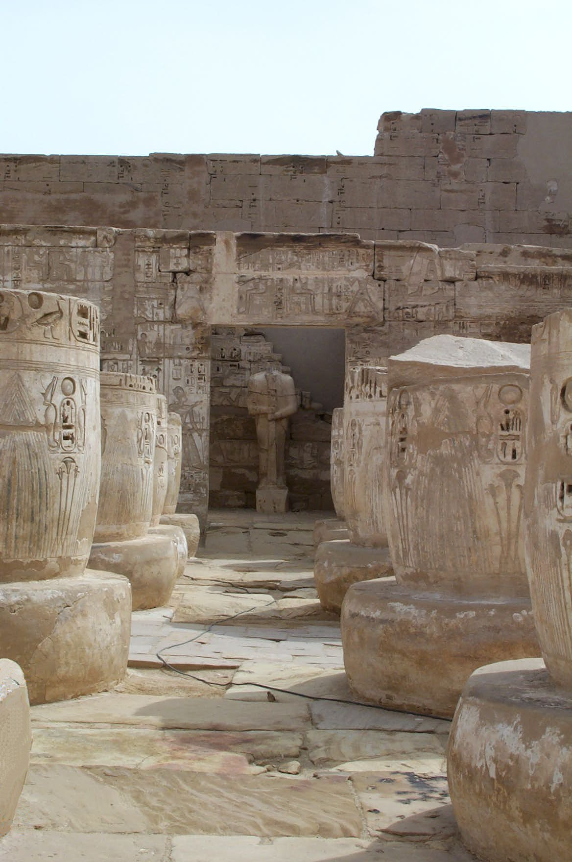 Ptah isten az első hüposztül csarnokban (Medinet Habu)